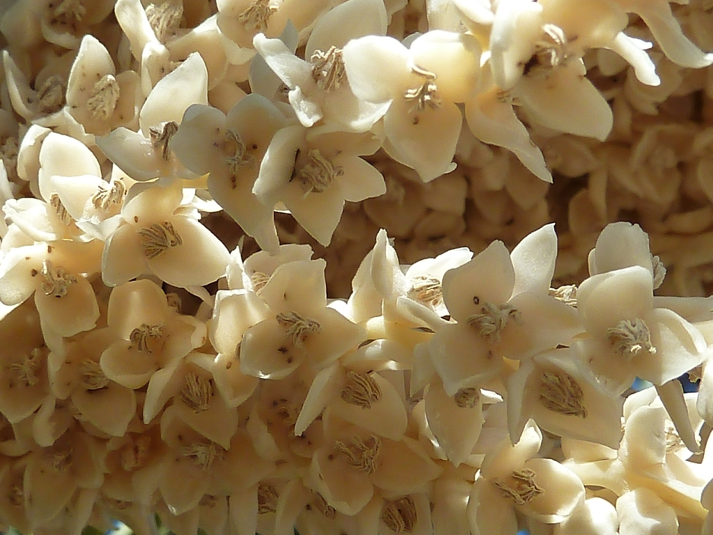 Phoenix dactylifera (Palmera datilera) : flores macho - La Huerta, Albatera (Alicante, España).